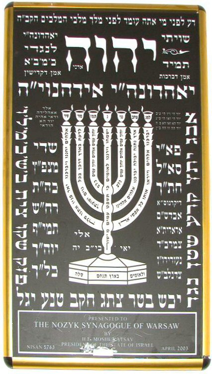 Tablica pamiątowa w synagodze Nożyków. Grafikę wyprostował User:Hiuppo